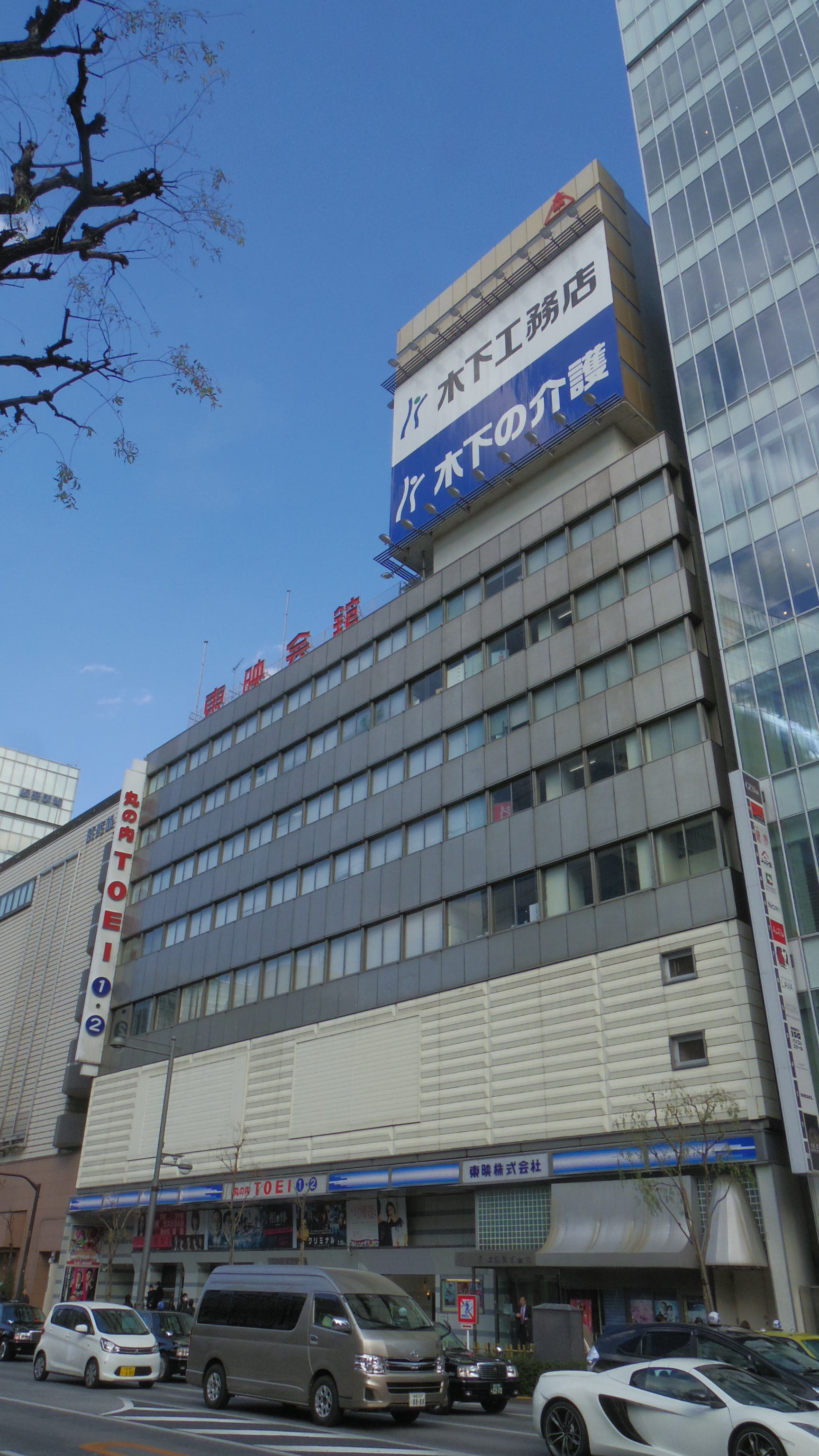 銀座東映会館。東映本社と、同社系の映画館「丸の内TOEI1・2」が入る。撮影時、映画『相棒 -劇場版IV- 首都クライシス 人質は50万人! 特命係 最後の決断』が公開中だった（2017年3月11日撮影）。